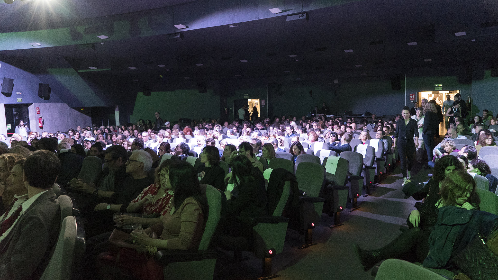 Sala de cine en la inauguración del Festival de Cine por Mujeres. Palacio de la prensa